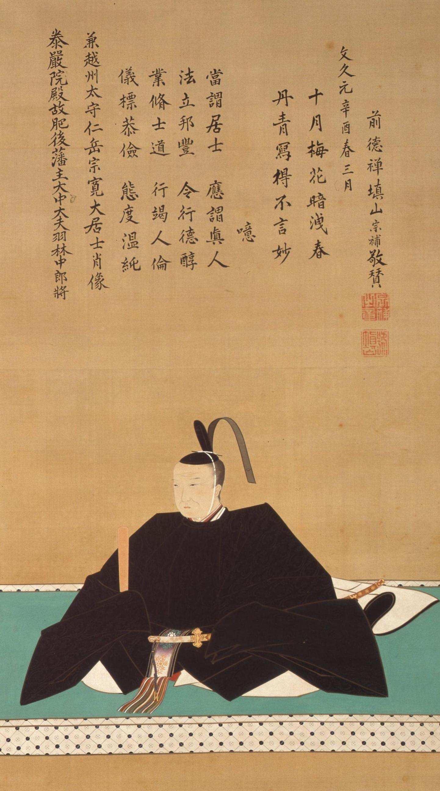 細川斉護の肖像。